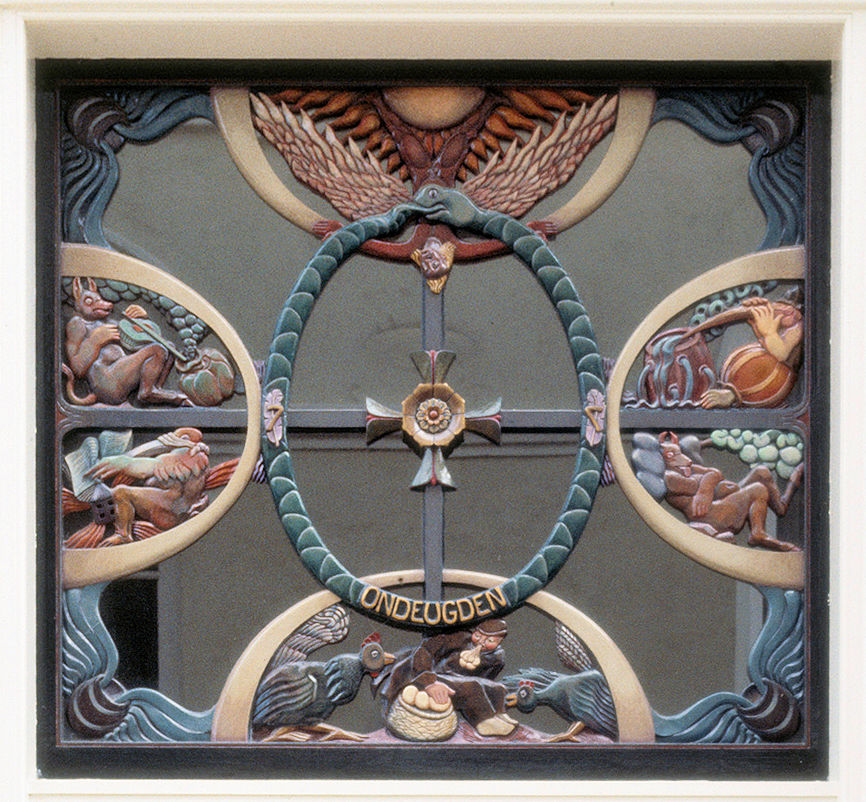 Exterieur BOVENLICHT, HOUTSNIJWERK ("ONDEUGDEN")